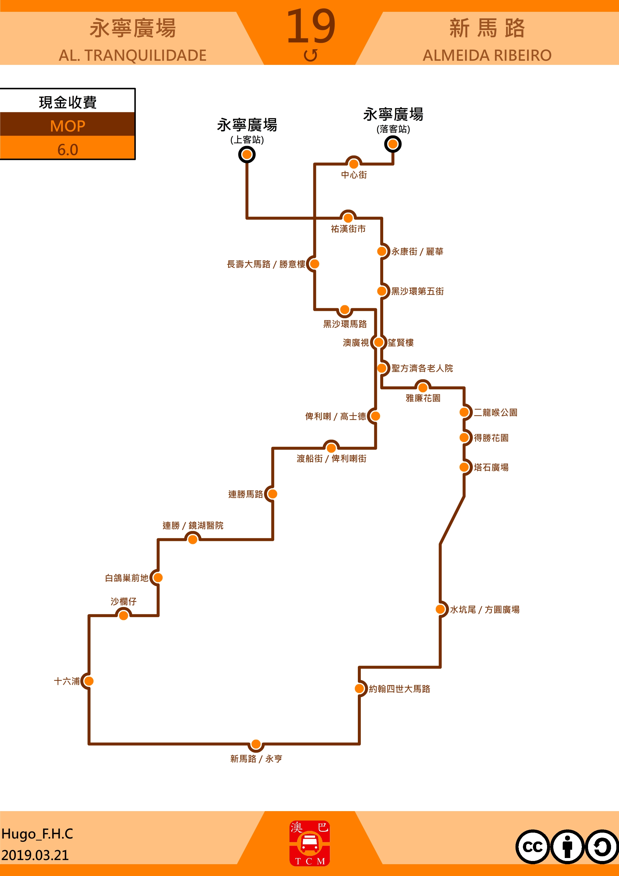 澳門巴士19走線圖